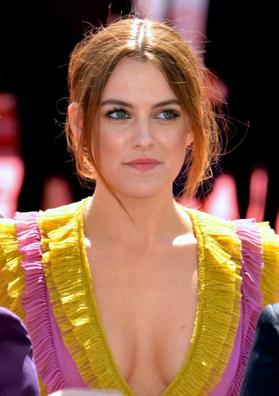 Riley Keough au festival de Cannes